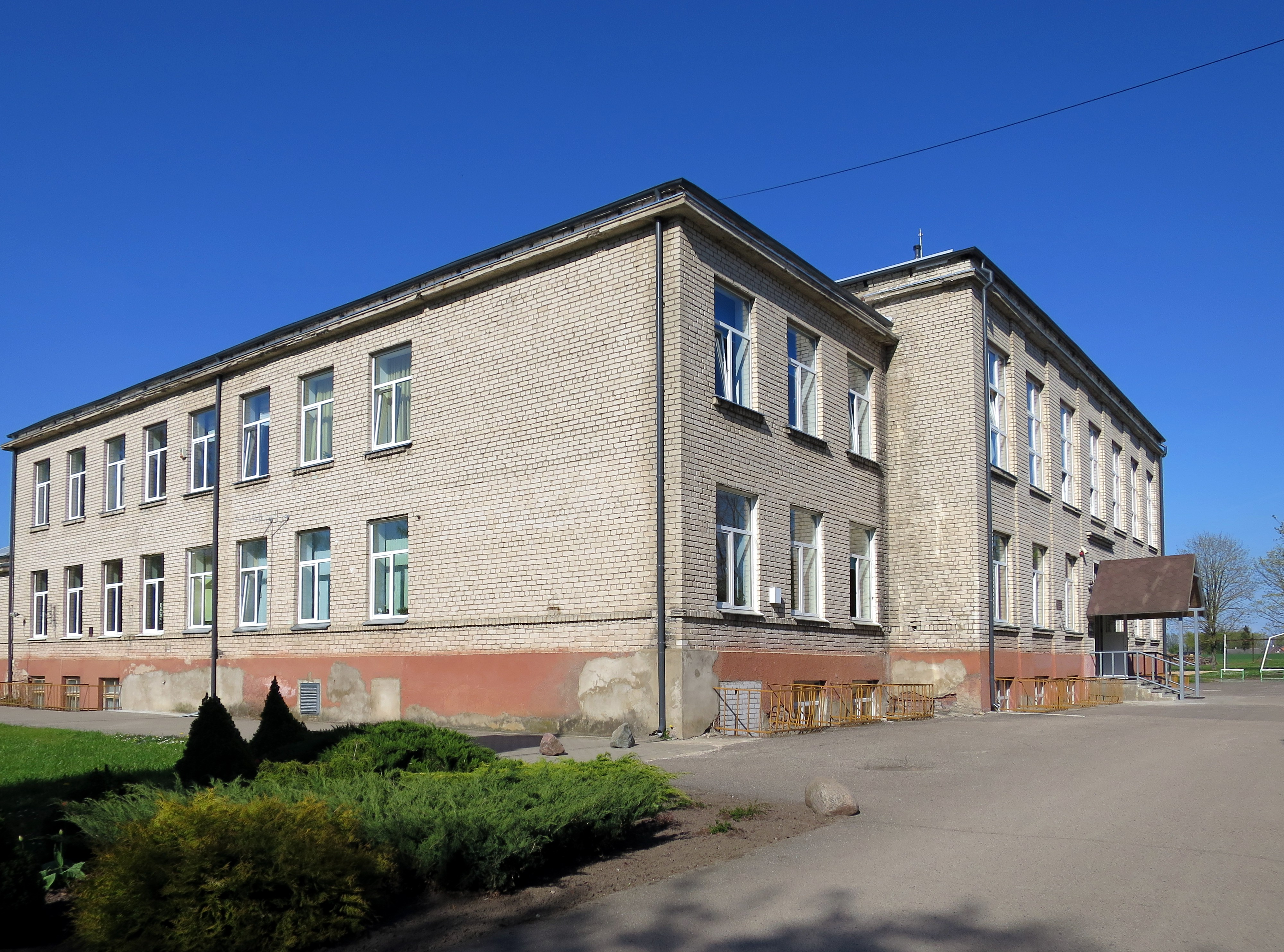 Džūkstes skolas ēka.